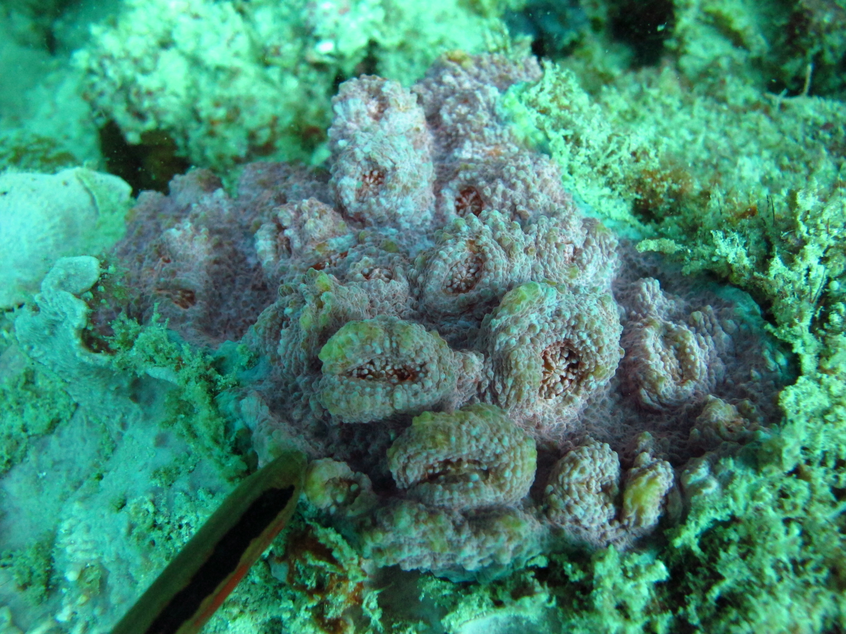 Echinophyllia orpheensis en la isla Mer, Estrech de Torres, Australia